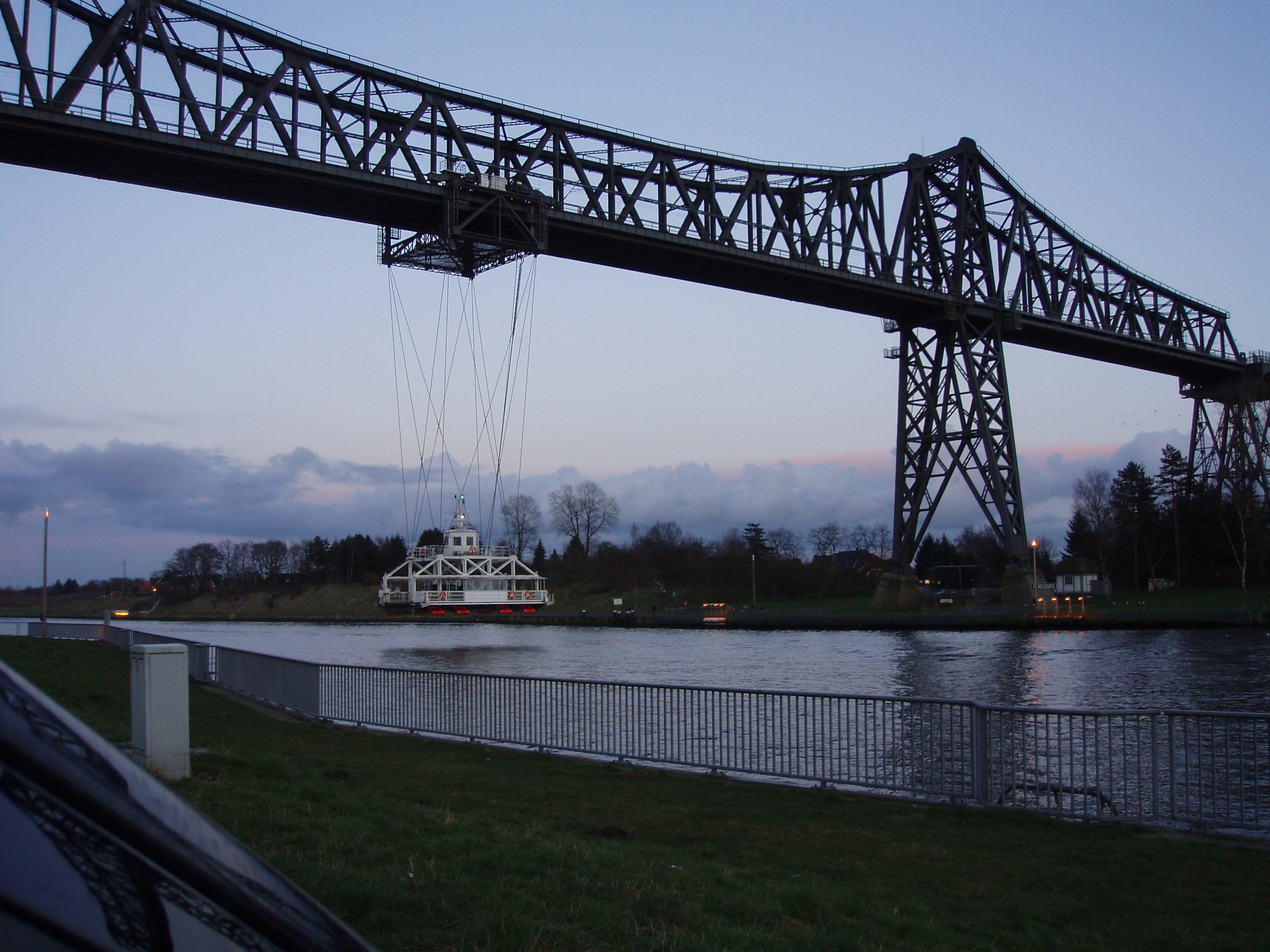 Schwebefähre in Abendfahrt